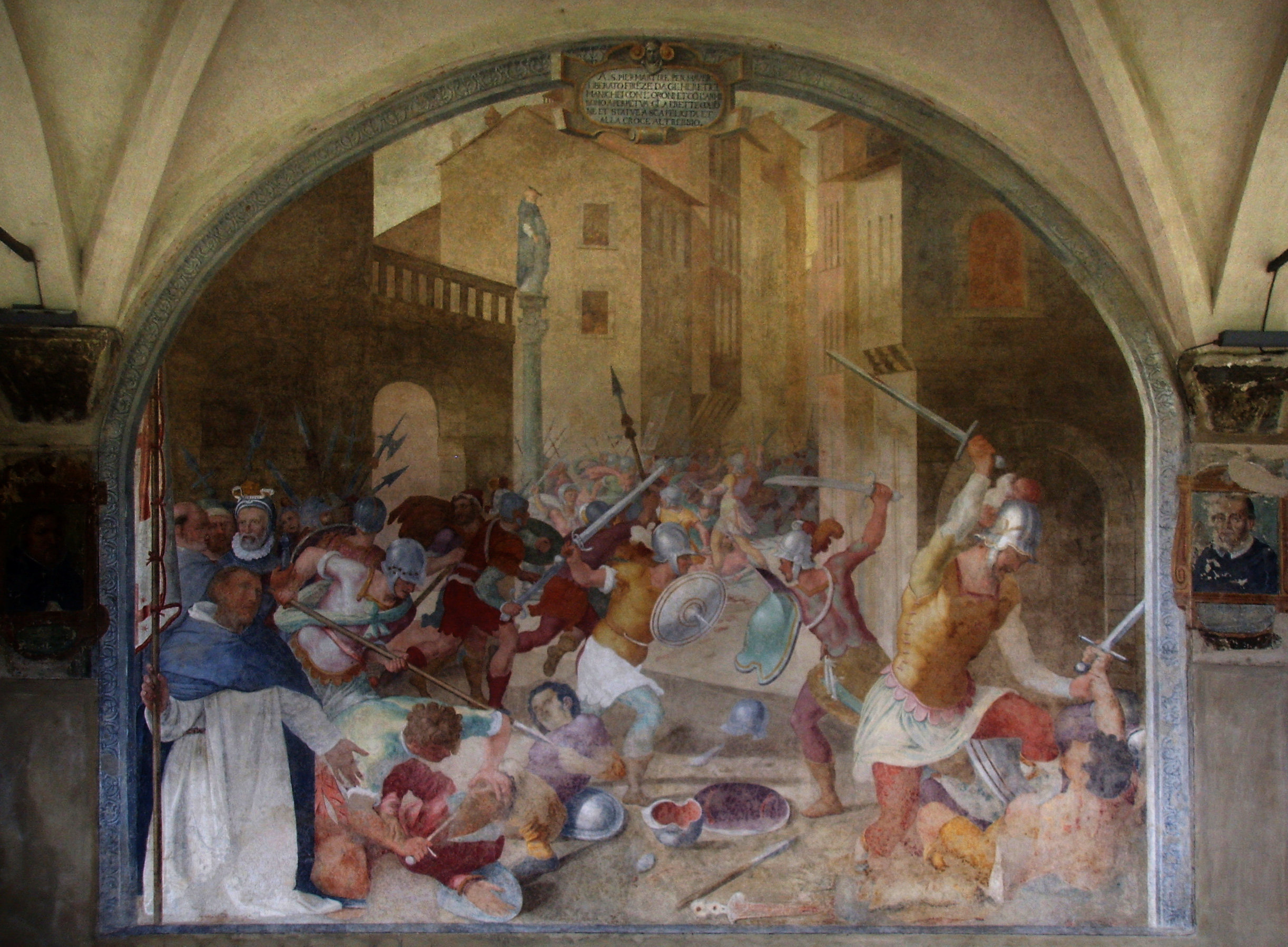 Lorenzo Sciorina, Battaglia tra cattolici ed eretici al tempo di San Pietro Martire - Chiostro Grande in Santa Maria Novella church fresco in Florence, Italy.